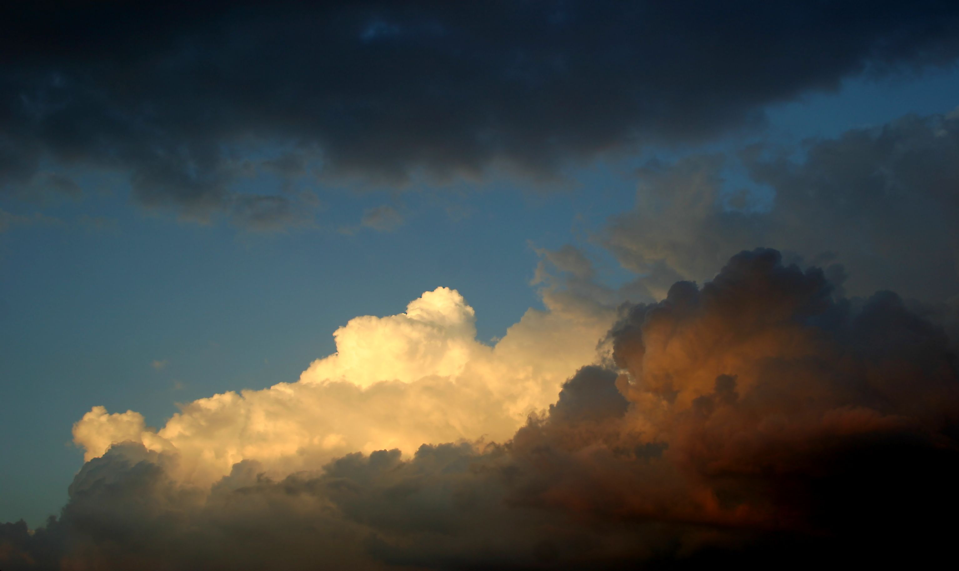 Beleuchtete Wolken nach Regen über Bremen